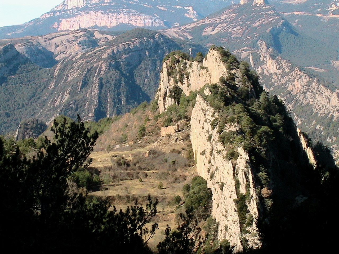 La masia de Trasserra s'arracera sota el tossal homónim, sobre un coll ampli. Al fons s'observen les discordances progressives de Sant Llorenç